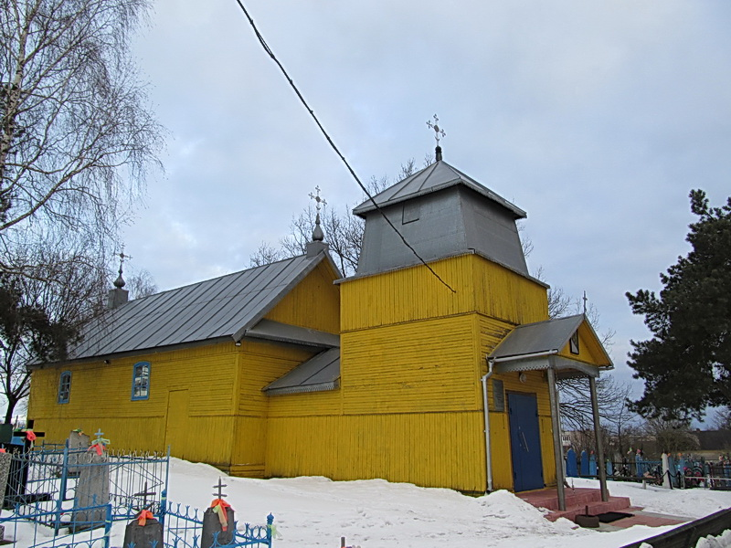 Аброва. Царква